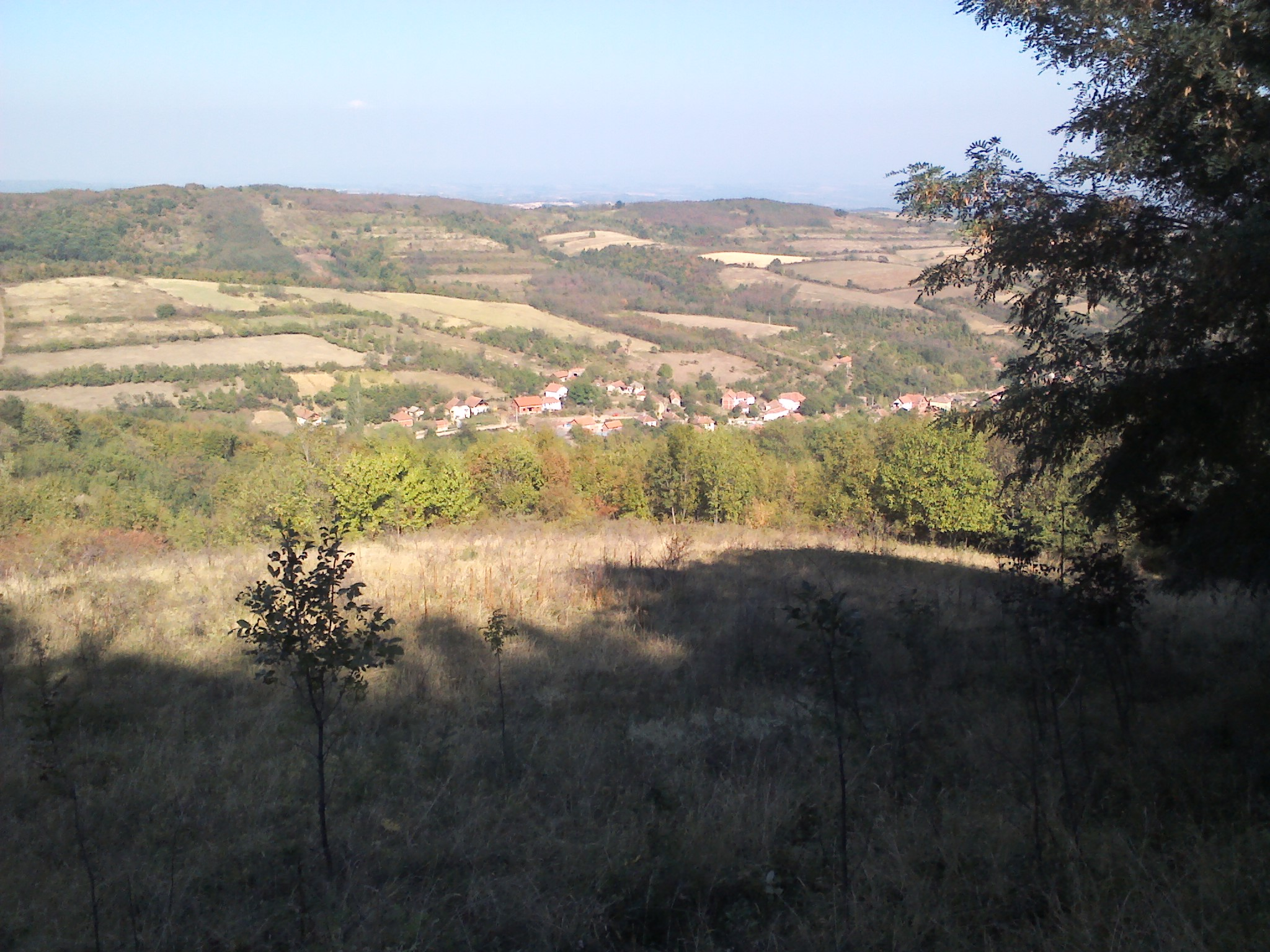 Pogled na Gornje Štiplje.